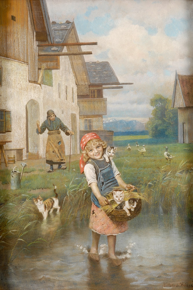 Die Katzenmama.